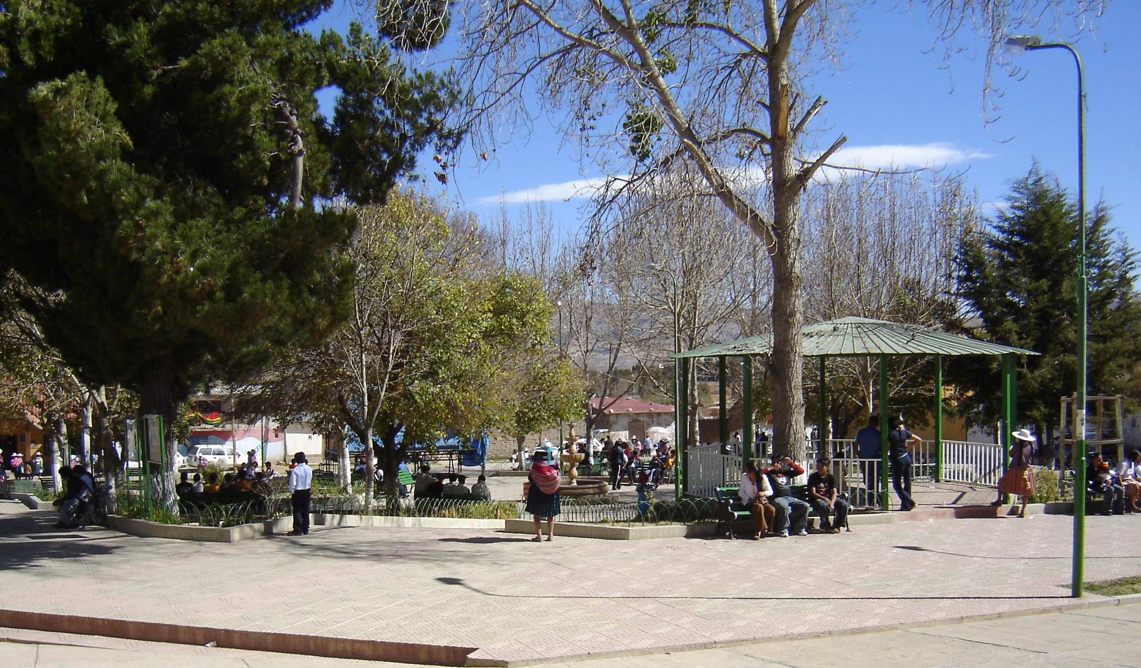 Una vista de la Plaza 4 de diciembre, la plaza central de la población de Vacas, realizada el día 6 de agosto de 2008.